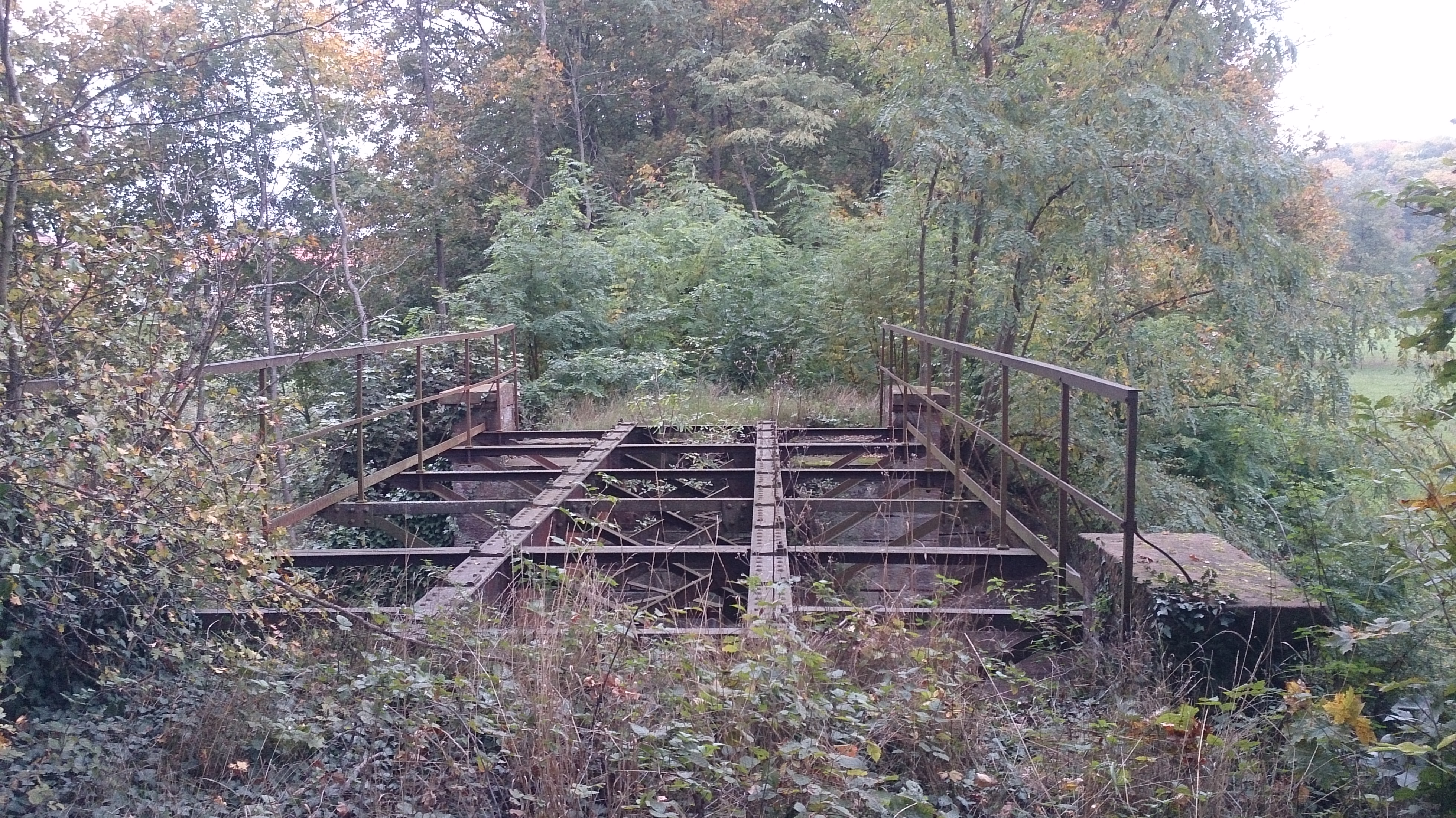 Pont sur la soultzbach, dernier ouvrage d'art de la ligne Buuxwiller - Ingwiller encore présent de nos jours.